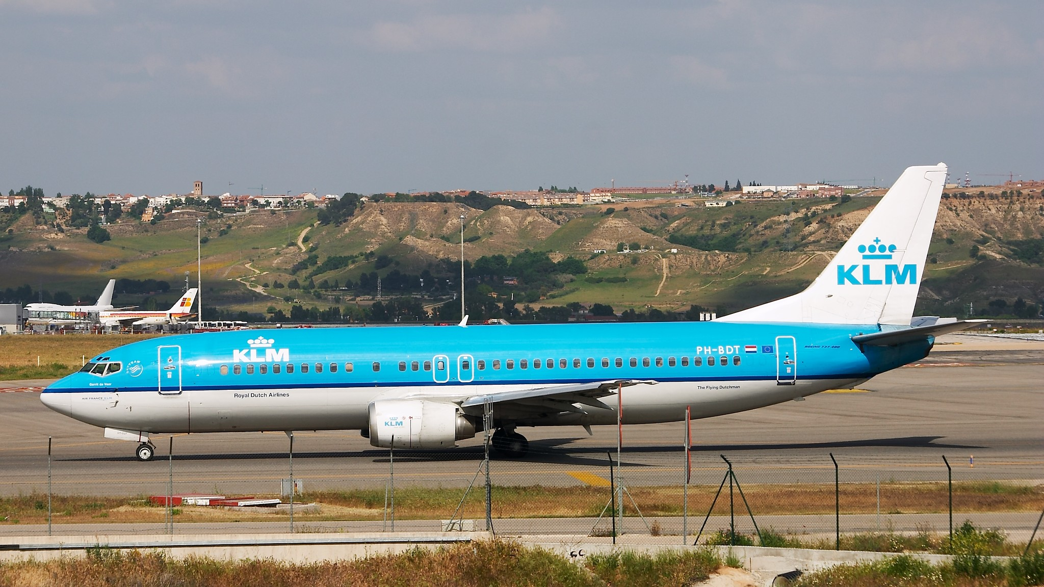 Boeing 737-406 de KLM. Aeropuerto de Madrid Barajas.